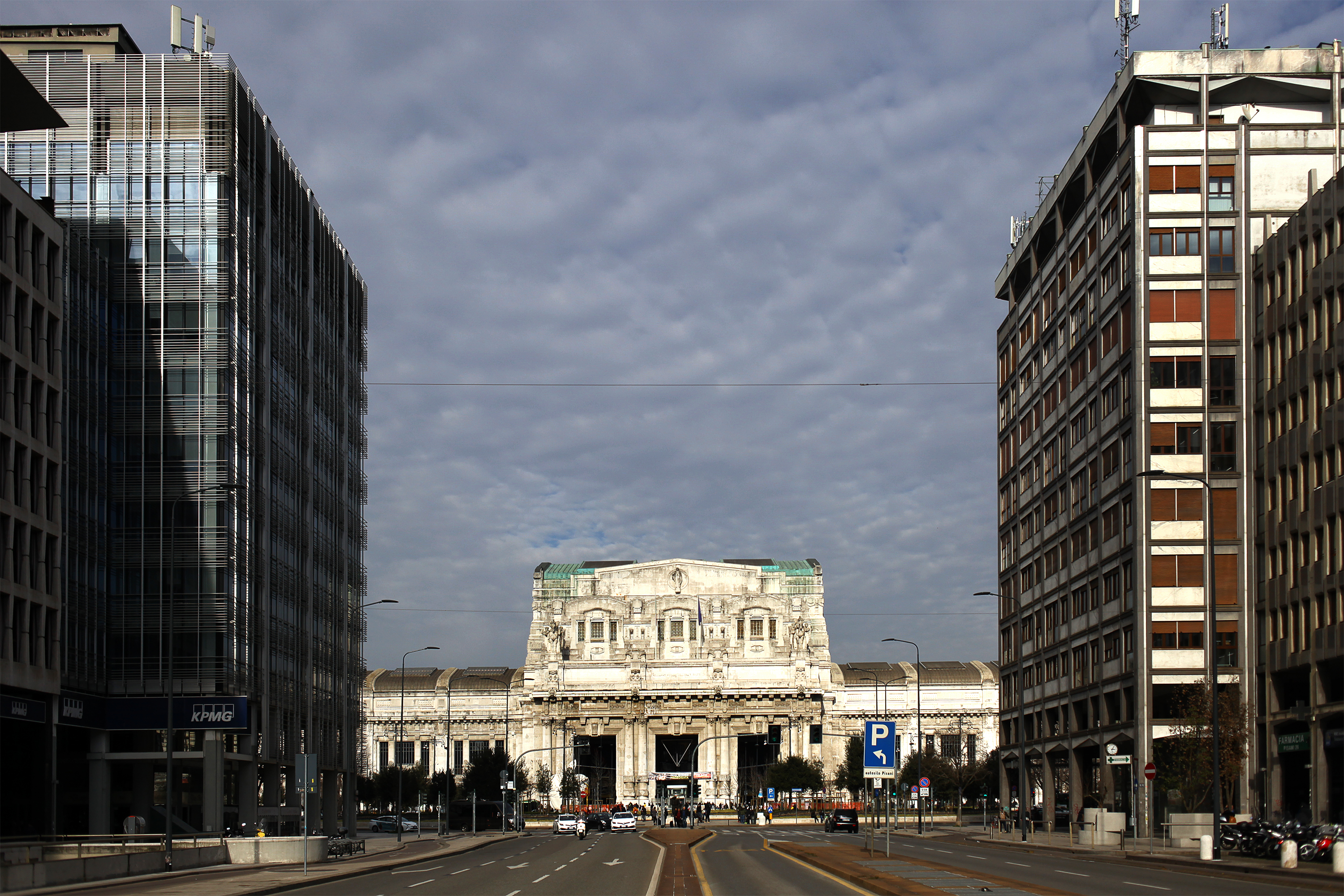 La Stazione Centrale di Milano vista da via Vittor Pisani